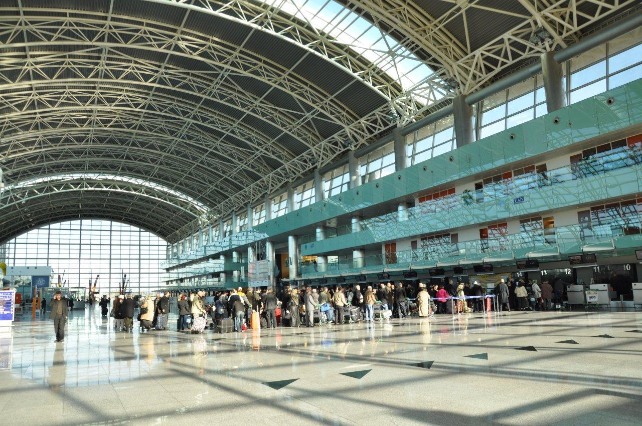 Adnan Menderes Havalimanı iç görünümü